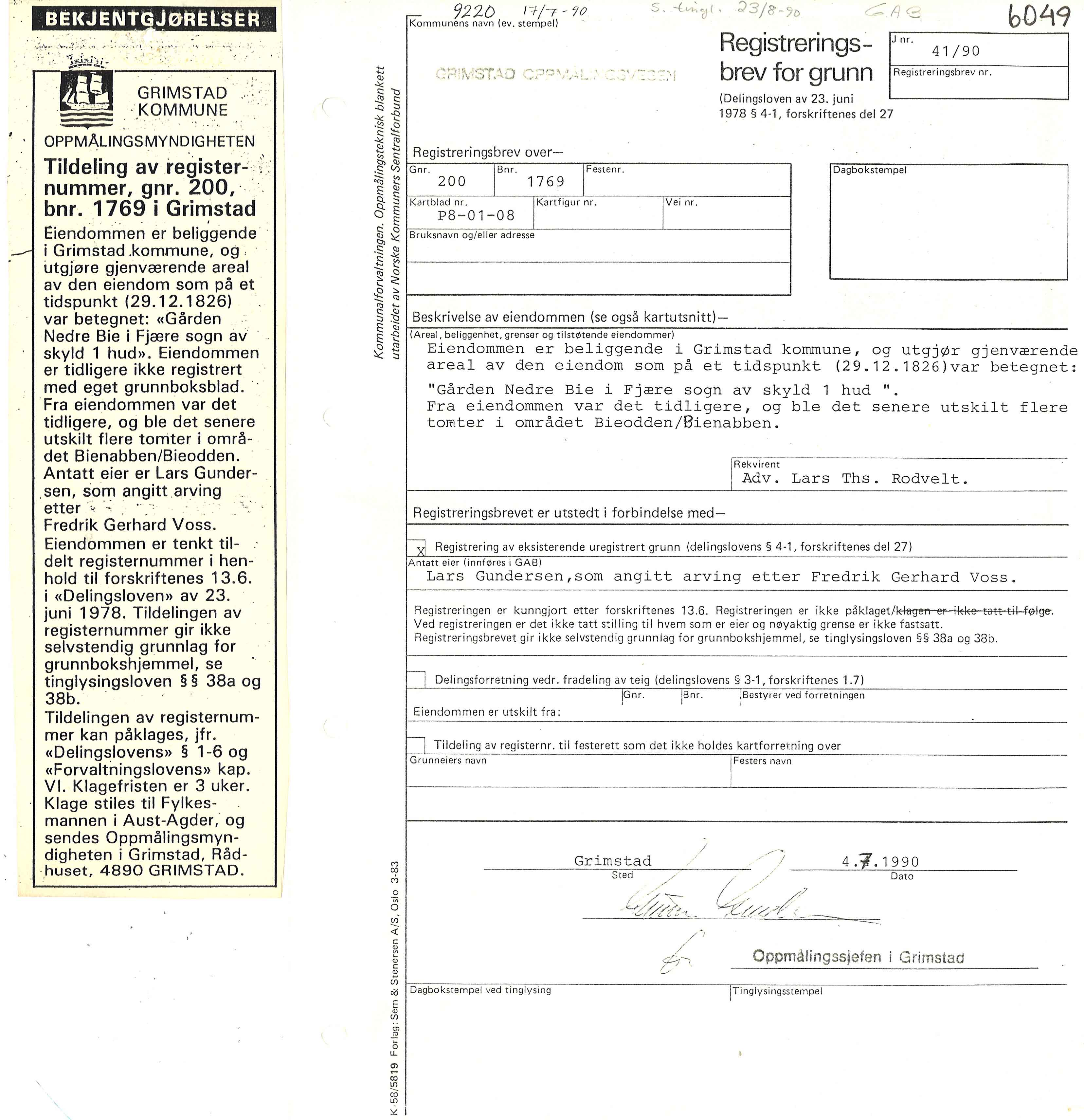 Registreringsbrev (example) - Grimstad